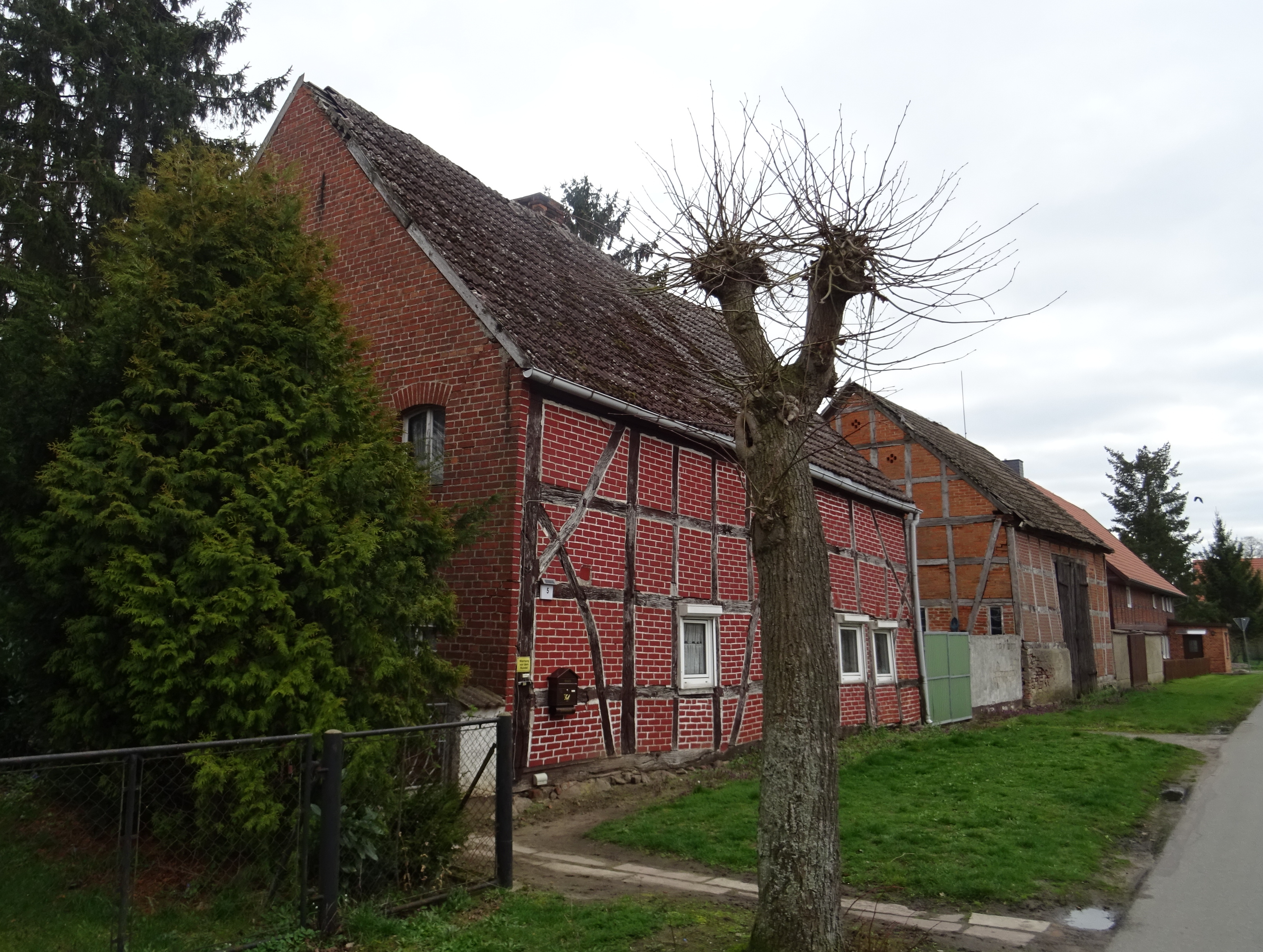 Beuster, denkmalgeschütztes Wohnhaus Wehlstr. 5